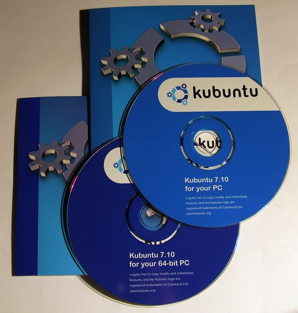 Licensing: This image or multimedia was created by Bartosz Senderek. The image or audio is licensed under CC-BY license. Attribution to me is required. Licencja: Ten obrazek lub plik multimedialny został stworzony przez Barotsza Senderka. Został on udostępniony na licencji CC-BY. Informacja o moim autorstwie jest wymagana. "I want to use the image/multimedia. How can I do that?" You can use this image/multimedia freely for any purpose, including commercial use, provided that you license it under the above license. My suggestion is to use text shown below: If you use the image I would appreciate it if you would let me know on my talk page, but this is not required as long as you follow the above license. "Chcę użyć tego pliku. Jak mogę to zrobić?" Możesz używać tej grafiki/multimediów darmowo w każdym celu, włączając użycie komercyjne, udostępniając go dalej na powyższej licencji. Jeśli zdecydujesz się na publikację zdjęcia mojego autorstwa obowiązkowo podpisz go w sposób podany w sekcji "Licensing text". Jeżeli użyłeś mojego pliku możesz powiadomić mnie o tym na mojej stronie dyskusji, lecz nie jest to wymagane, dopóki trzymasz się powyższej licencji.